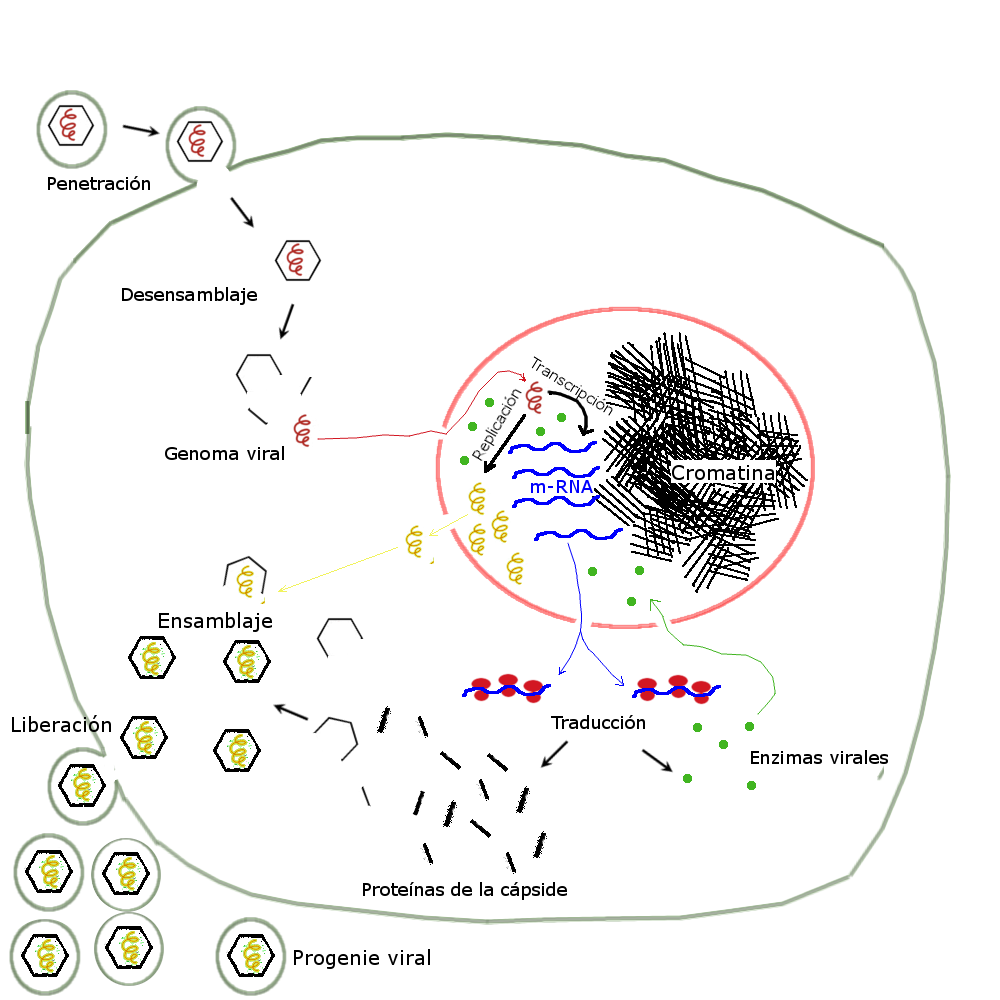 Esquema de la multiplicación intracelular de un virus